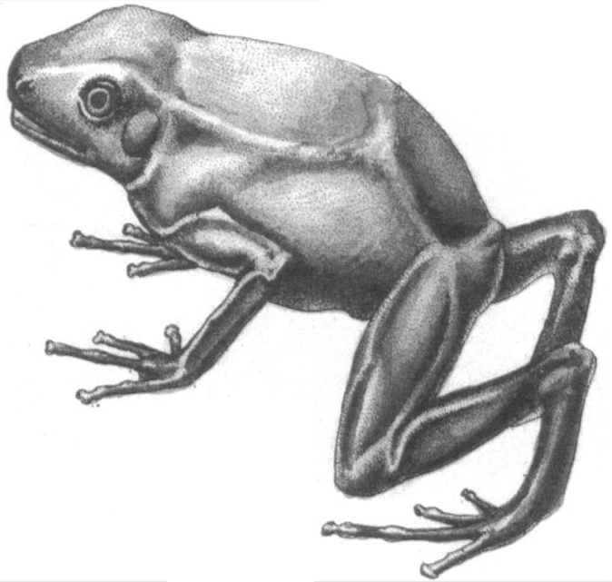 Illustration faite par Berthold en 1846 d'une Phyllobates melanorrhinus, qui s'avèrr être en fait une Phyllobates bicolor.